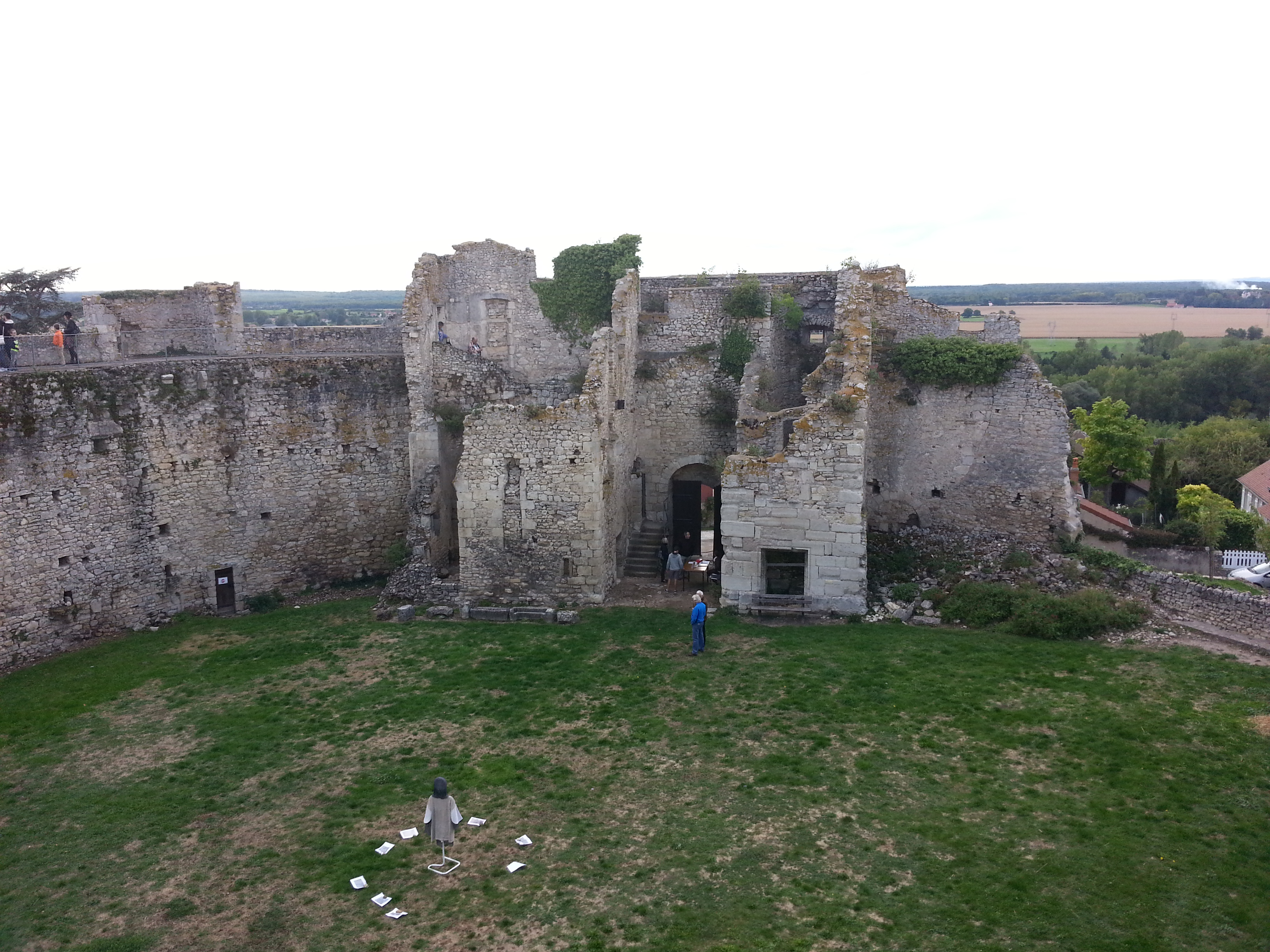 Cour intérieure du château de Billy